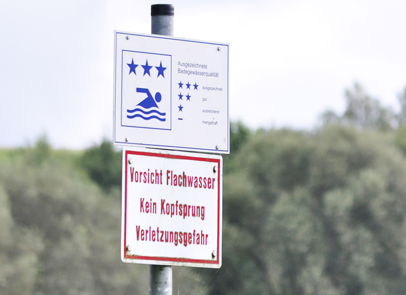 Wendebachstausee bei Göttingen, Ausschilderung nach EU-Richtlinie, 23.8.2014. Foto: F. Welter-Schultes